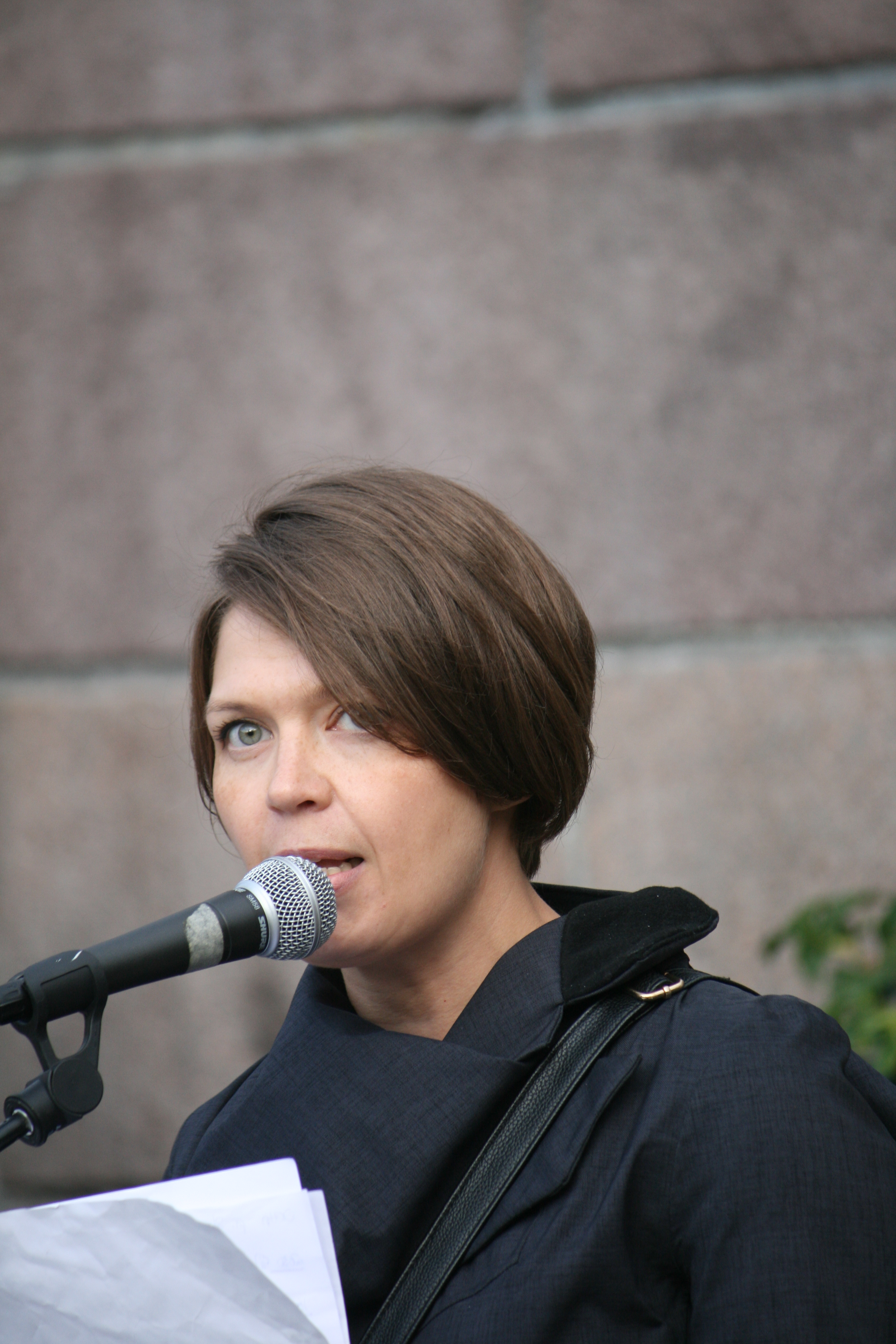 Kathrine Jensen, leder i Palestinakomiteen. Her på en demonstrasjon mot Israels krigføring mot Gazastripen i 2014.